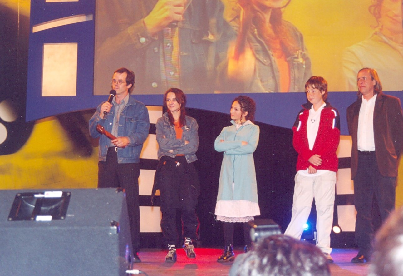 Andrés Wood, Aline Küpenheim y Manuela Martelli; premiación pelicula Machuca; año 2004